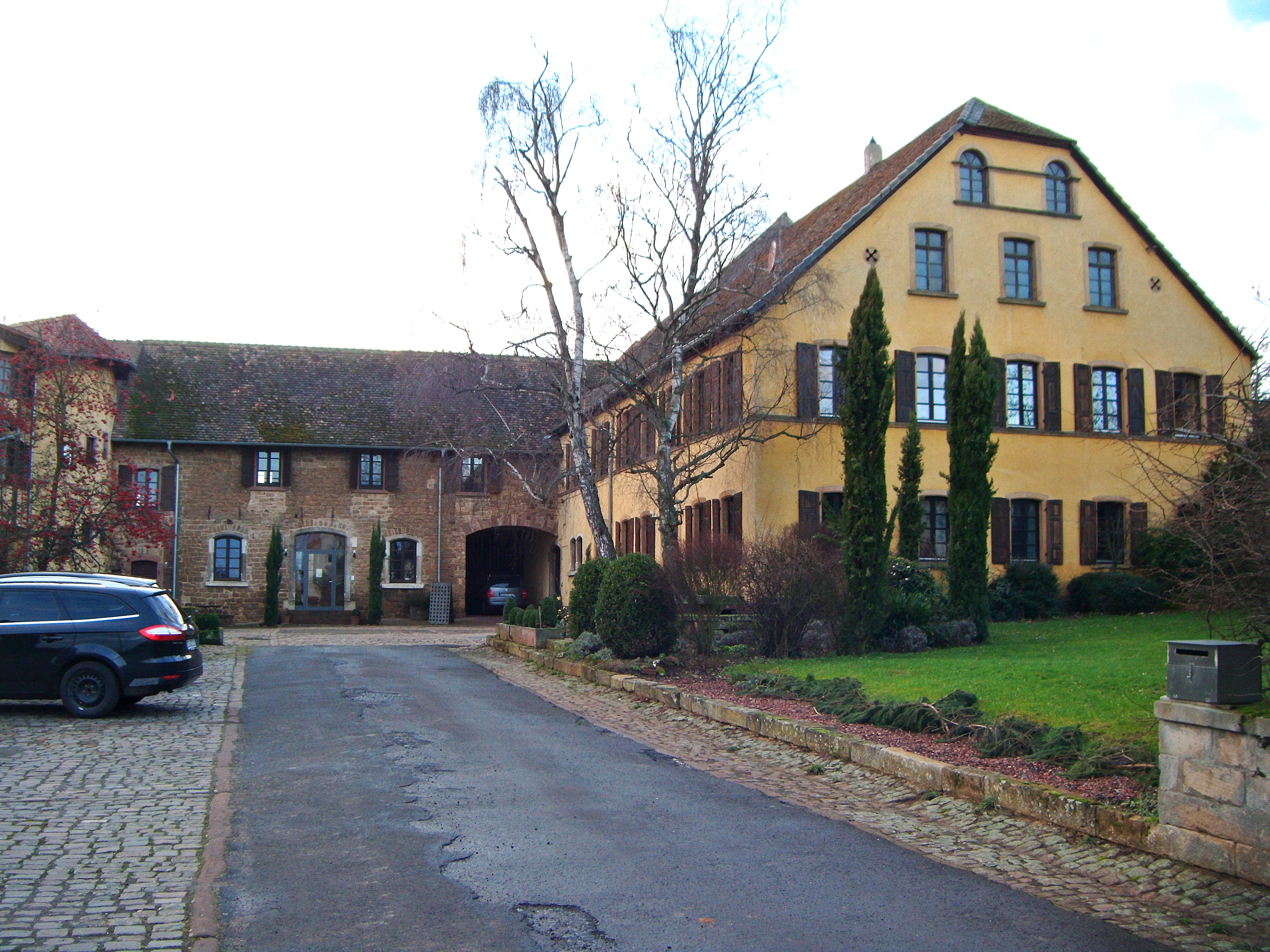 Battenberg (Pfalz), ehemals gräflich leiningisches Hofgut, Hauptstr. 1-3